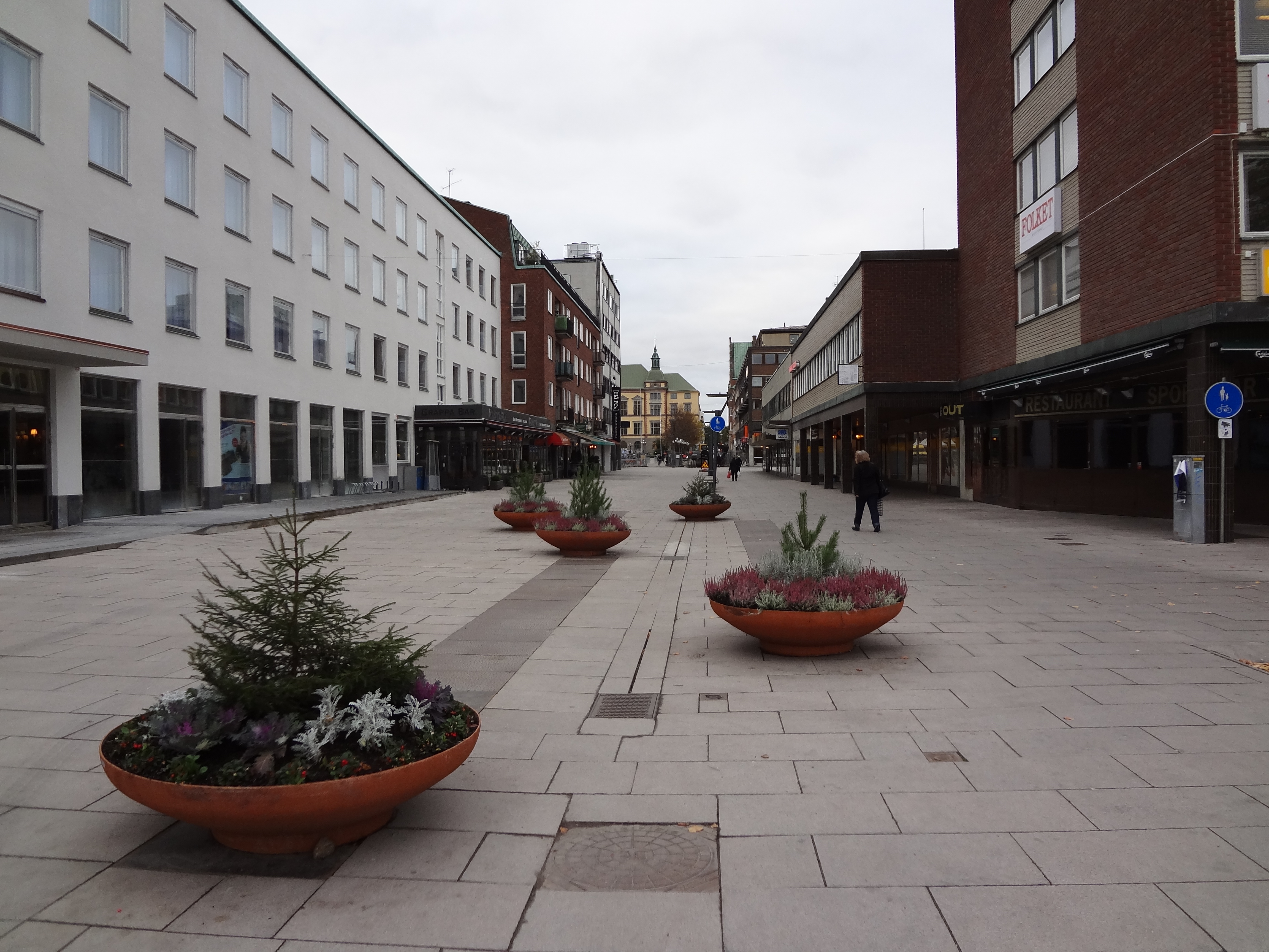 Nybrogatan i Eskilstuna, tittandes söderut. Eskilstuna stadshus är huset i bakgrunden.